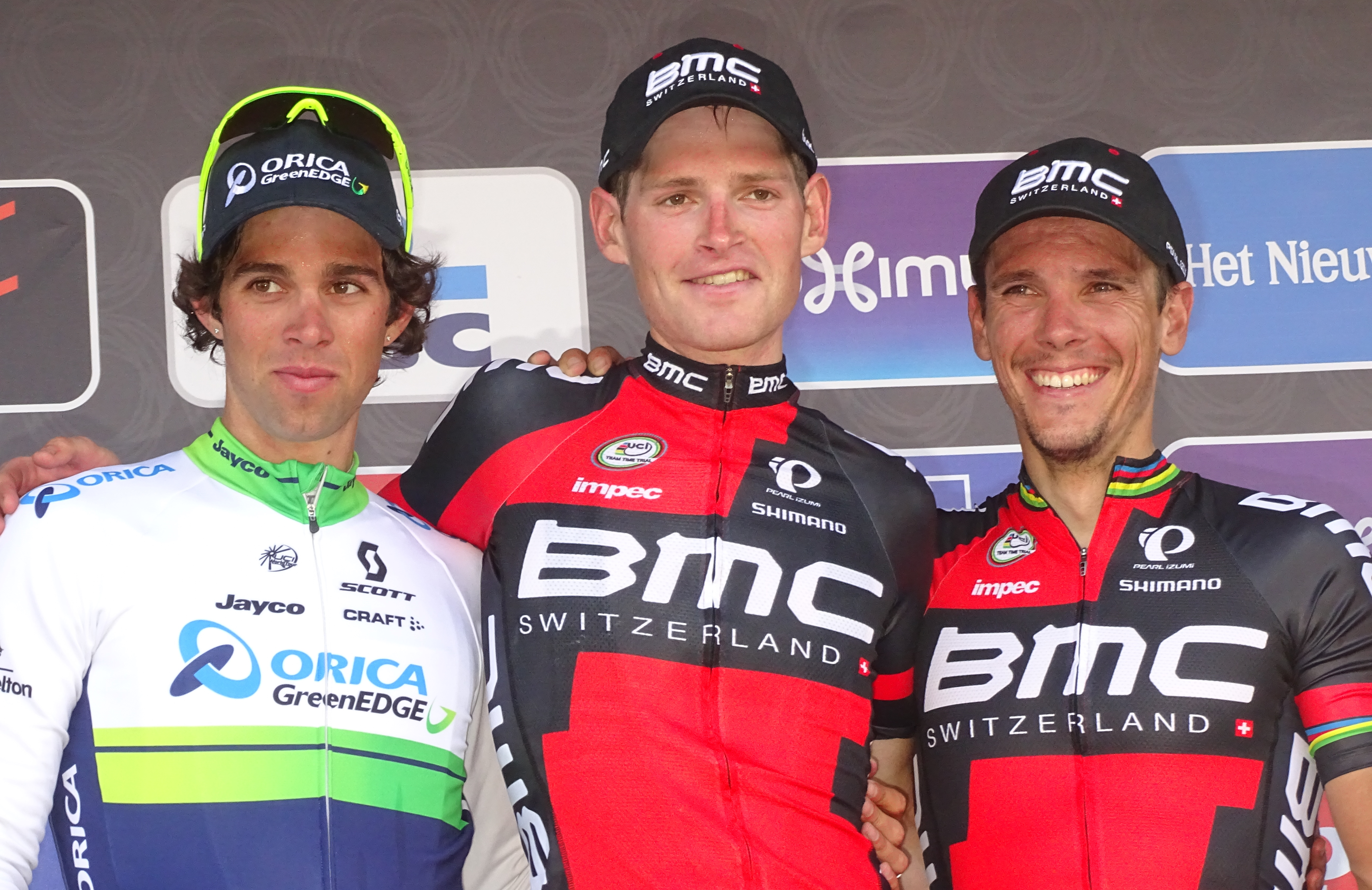 Reportage réalisé le mercredi 15 avril à l'occasion de l'arrivée de la Flèche brabançonne 2015 à Overijse, Belgique.